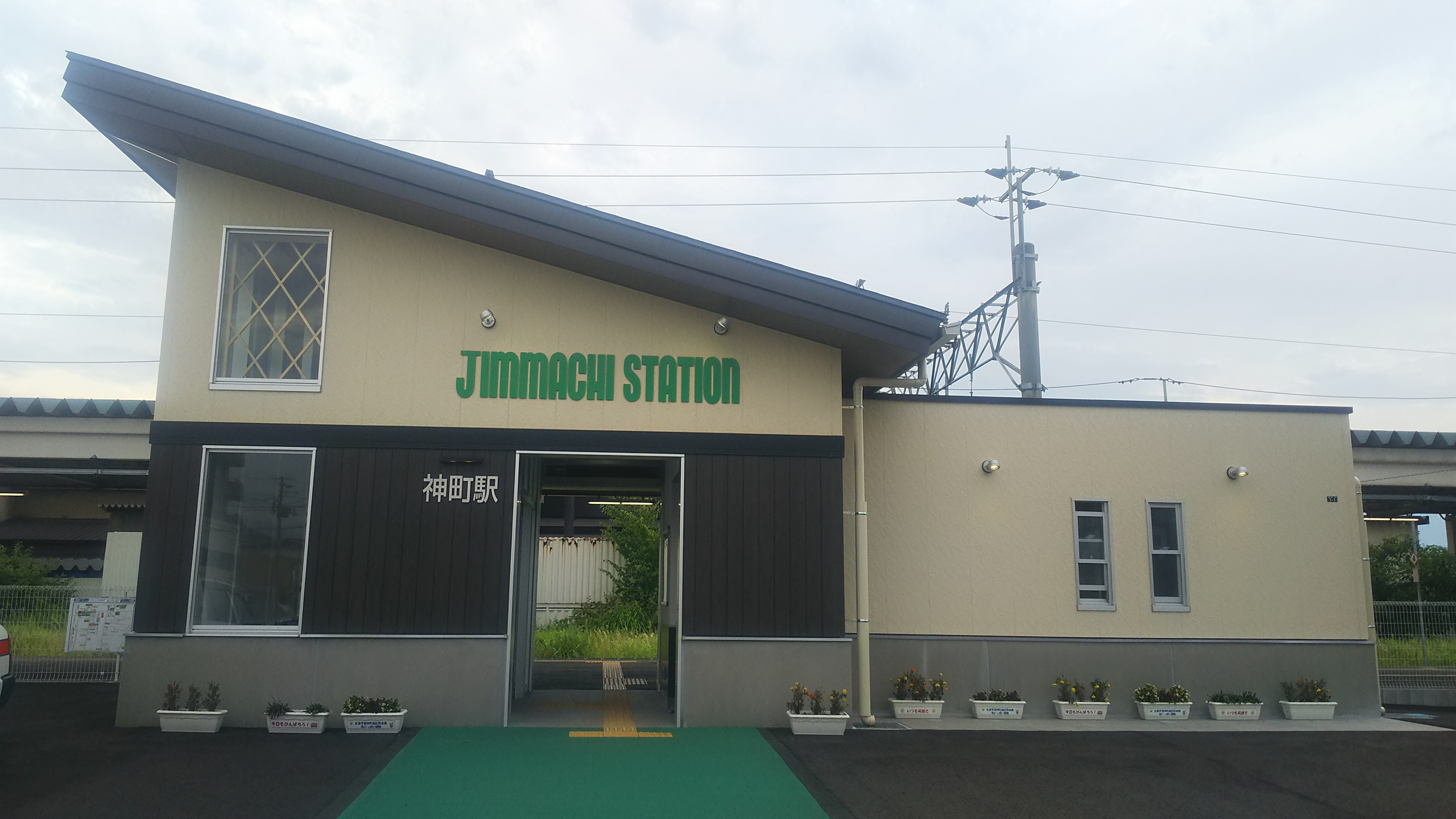 神町駅駅舎